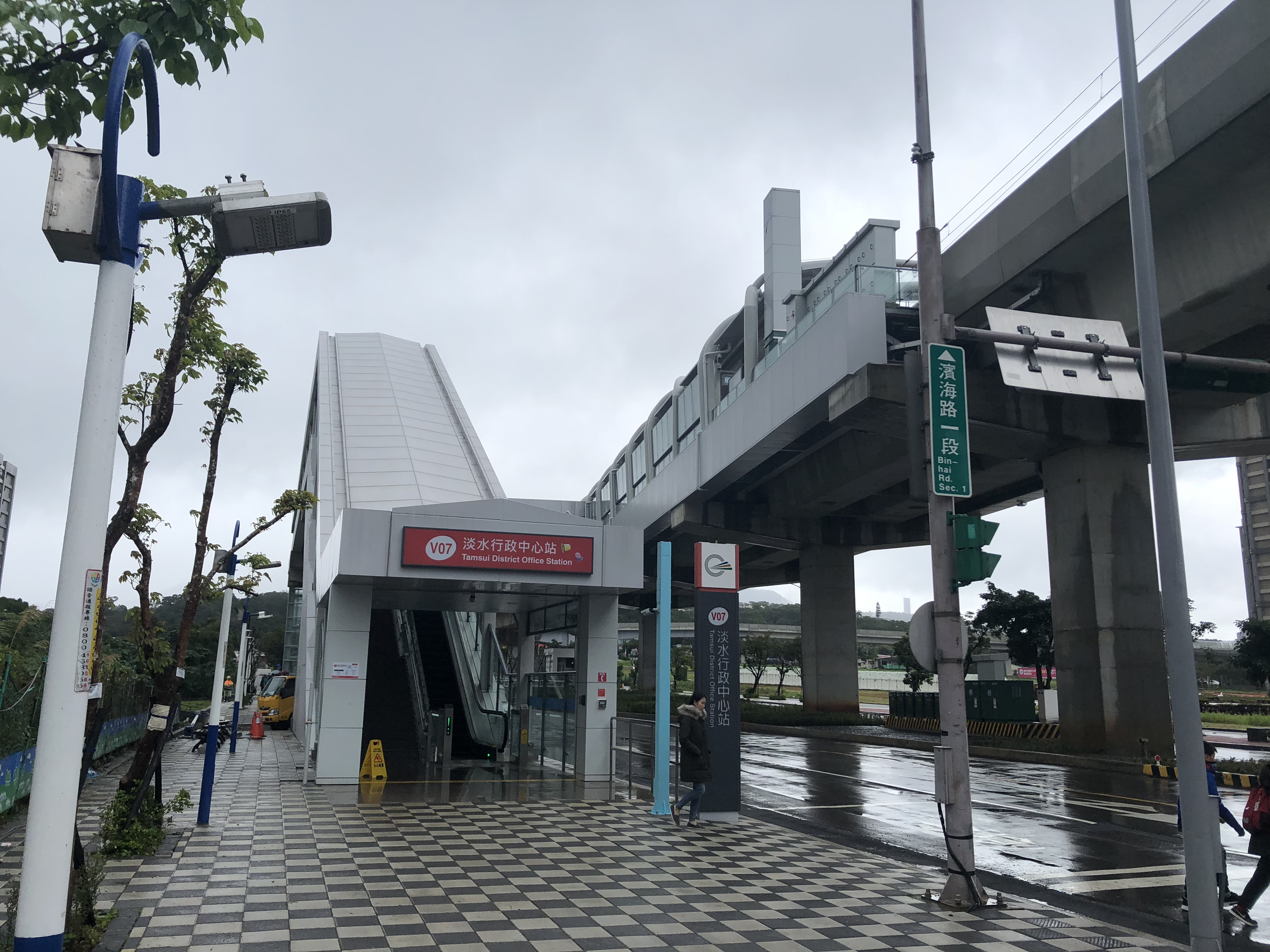 淡水行政中心站